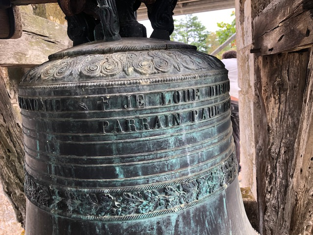 Cloche "Félicie" (1872) de l'église de la Pannonie, vue de l'intérieur du clocher.